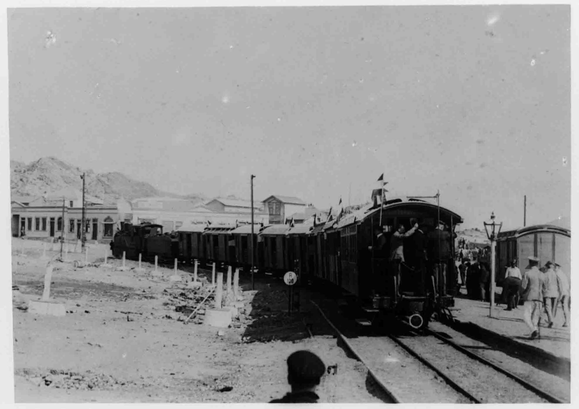 Abfahrt der Eisenbahn in Lüderitzbucht Standort: StuUB Bildnummer: 041-0241-33 CD-Code: CD/7255/3192/2216/7255_3192_2216_0034 Text auf dem Bild: Text auf der Hülle: Reihe 11 No 33 / Bgb 57 / Abfahrt der Eisenbahn in Lüderitzbucht - / lfde No 185 / S.W.A. Format Bildträger: 9x12 formale Bemerkung: Repro Entstehungsjahr: Entstehungsjahr Vorlage: Photograph: Region: DSWA Namibia - Lüderitzbucht Völker: Europäer Afrikaner (?) Sachgruppe: Bevölkerung - Personengruppe - Reisende Verkehr - Landverkehr - Eisenbahn - Eisenbahnwagen Verkehr - Landverkehr - Eisenbahn - Bahnsteig Verkehr - Landverkehr - Eisenbahn - Lokomotive